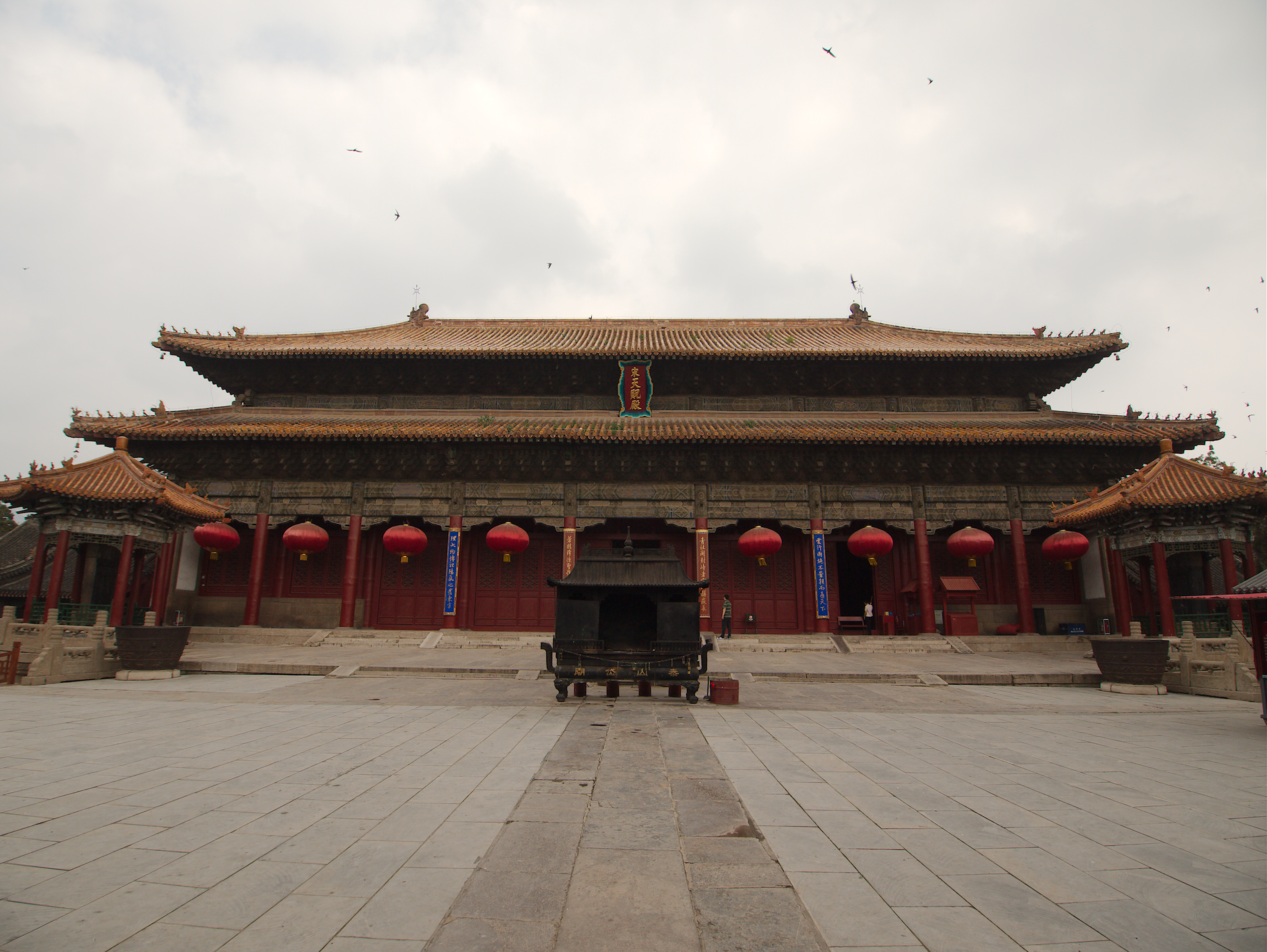 天贶殿 - Tiankuang Hall - 2012.06